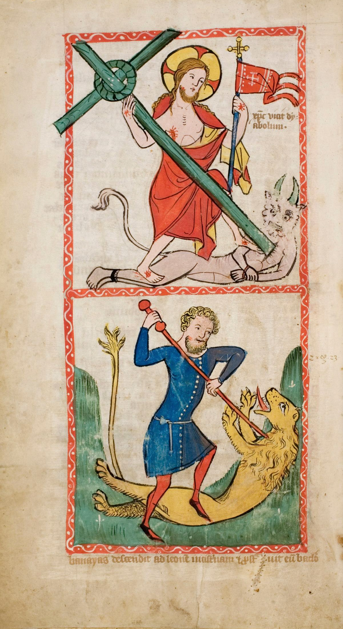 Speculum Humanae Salvationis, Westfalen oder Köln, um 1360. ULB Darmstadt, Hs 2505, fol. 54v / Christus triumphiert über den Teufel / Benaja, der Sohn Jojadas, tötet einen Löwen